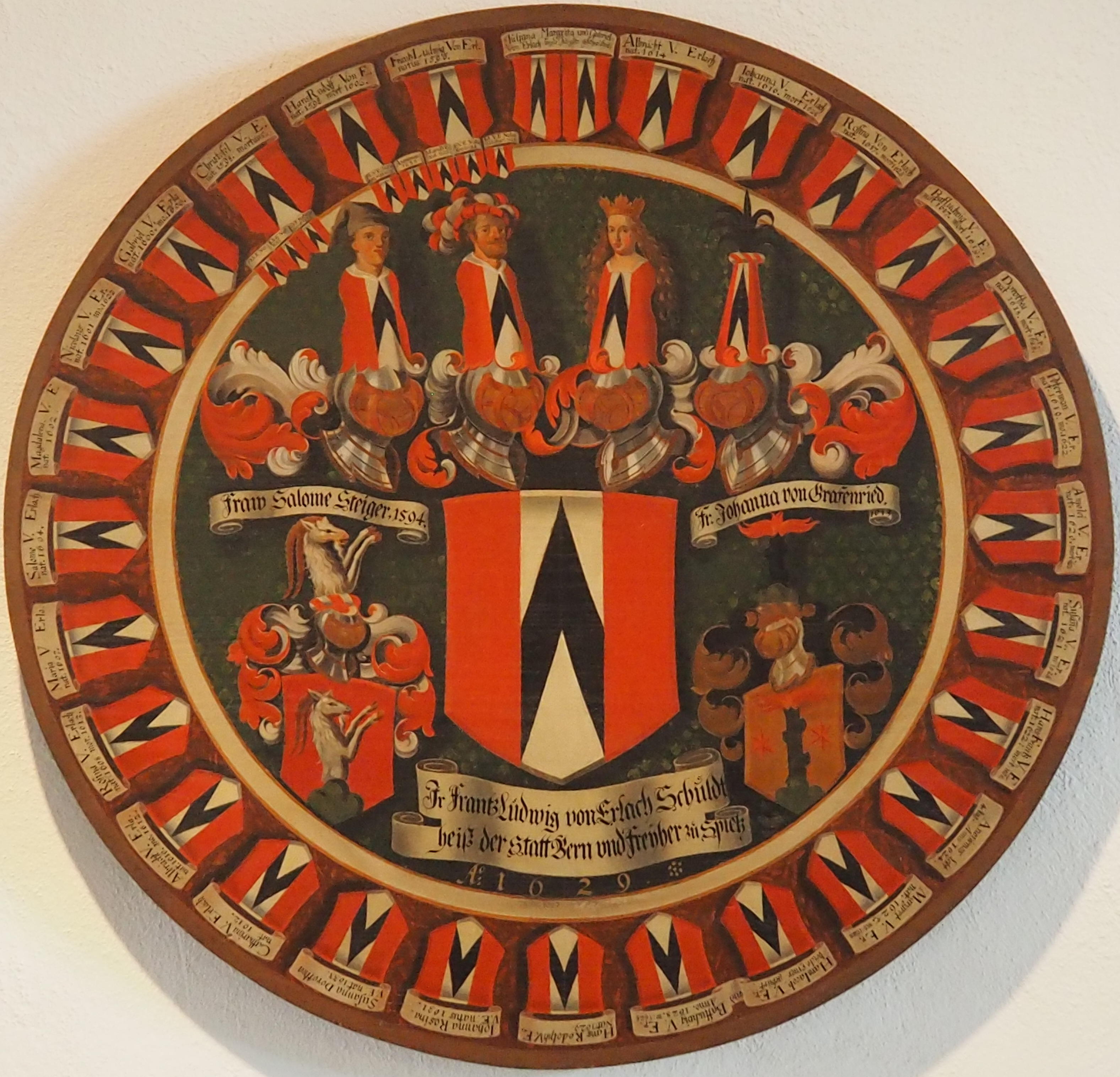 Schloss Spiez, Nachkommentafel Franz Ludwig von Erlach, 1629